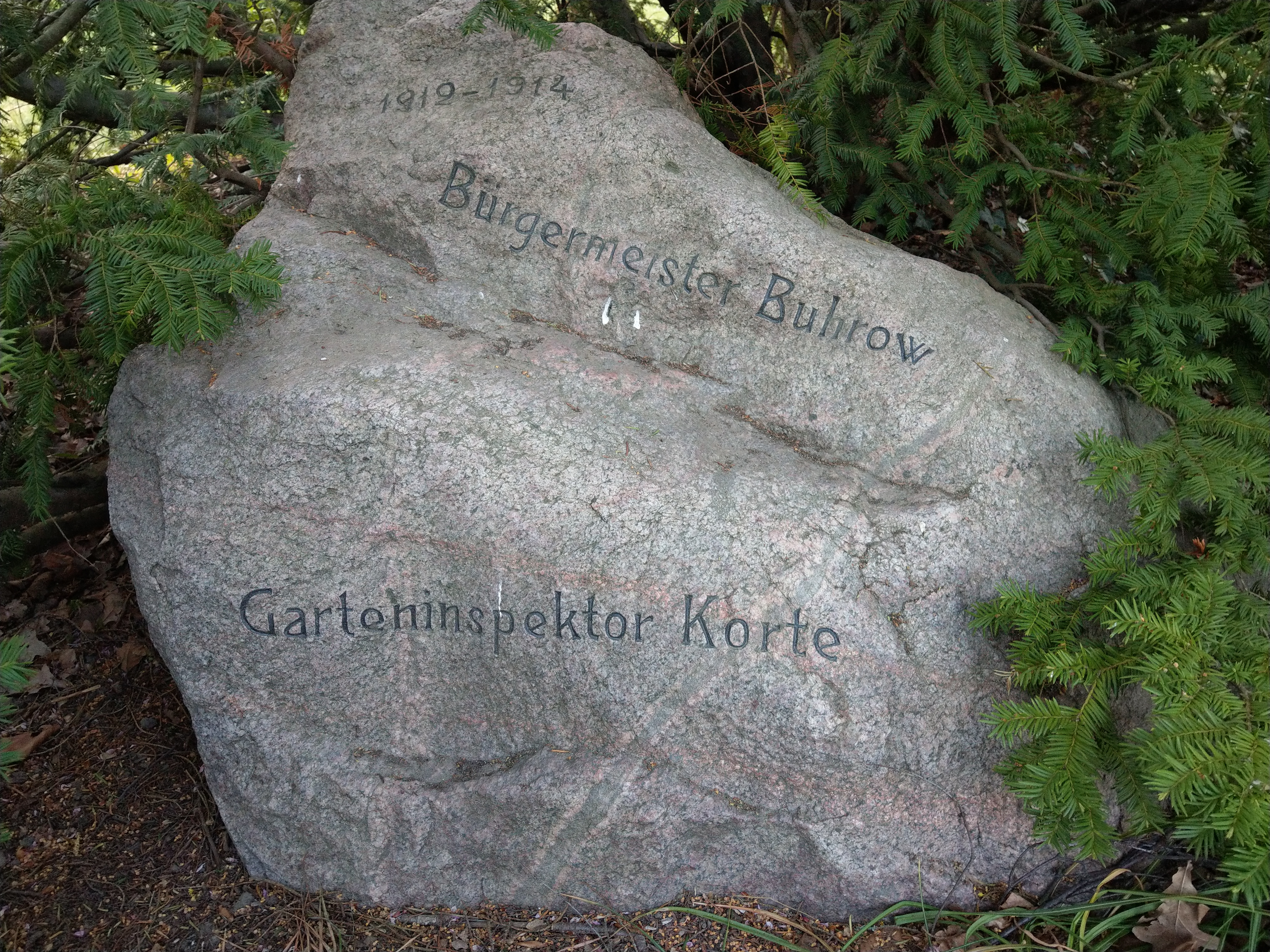 Gedenkstein an den Steglitzer Bürgermeister Karl Buhrow im Stadtpark Steglitz (nahe Brunnen)